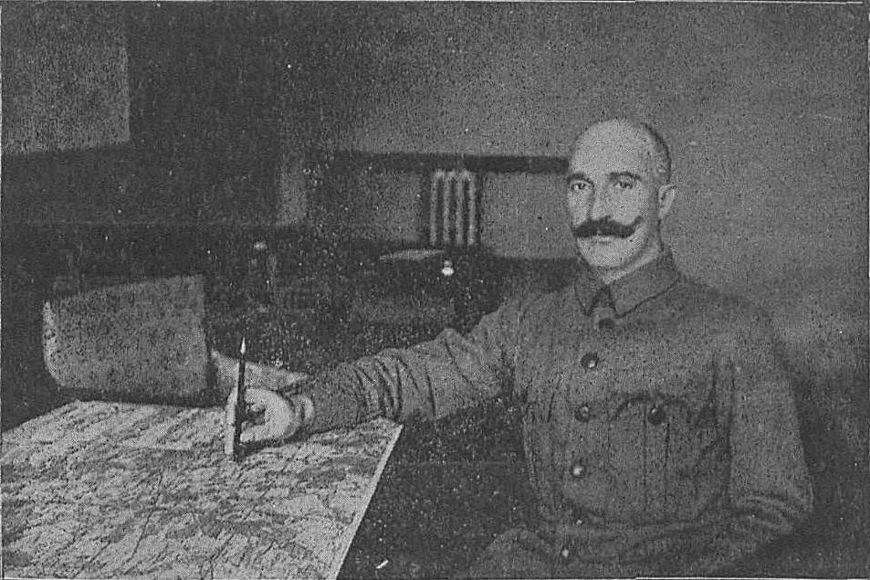 Czesław Mączyński przy pracy